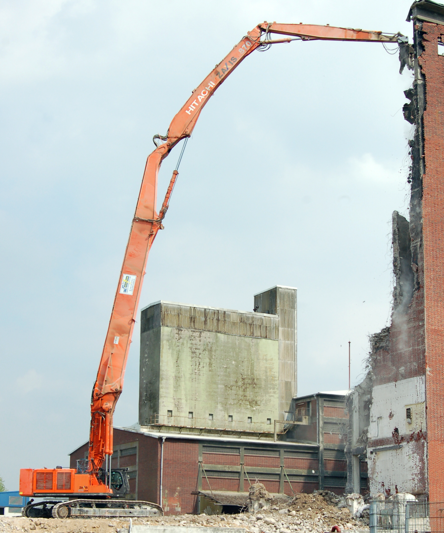 Hitachi Zaxis 870 LCH Longfrontkettenhydraulikbagger mit einer Arbeitshöhe von über 50 Metern bei den Abrissarbeiten am Raiffeisen Silo Uetersen, dieser ist zur Zeit der drittgrößte Longfrontbagger der Welt und wird nur noch durch einen Niederländischen (90 Meter Arbeitshöhe) und einem Amerikanischen Longfrontbagger mit einer Arbeitshöhe von 120 Metern übertroffen